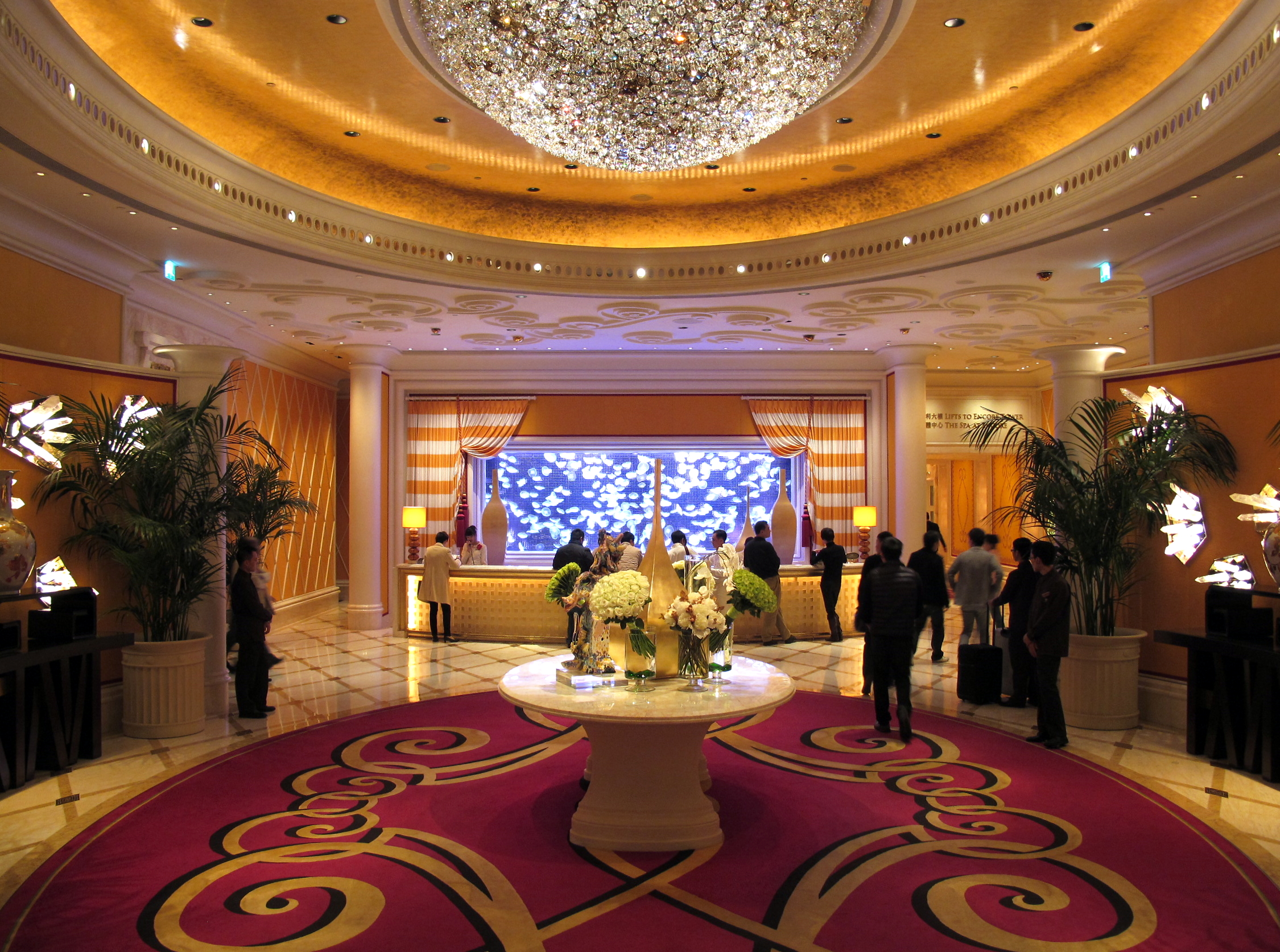 Wynn Encore Macau 澳門萬利酒店